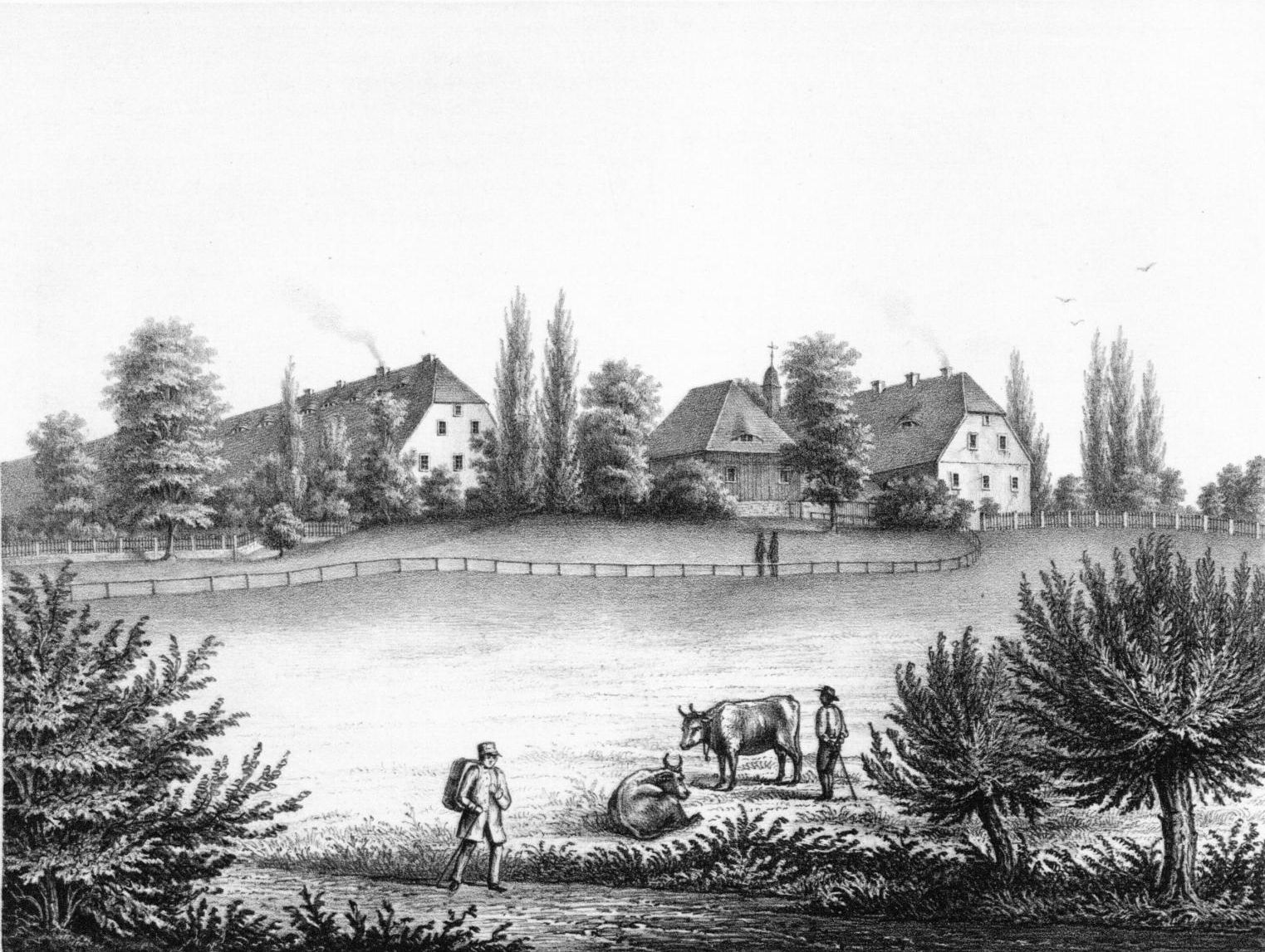 Rittergut Niederforchheim im Erzgebirge